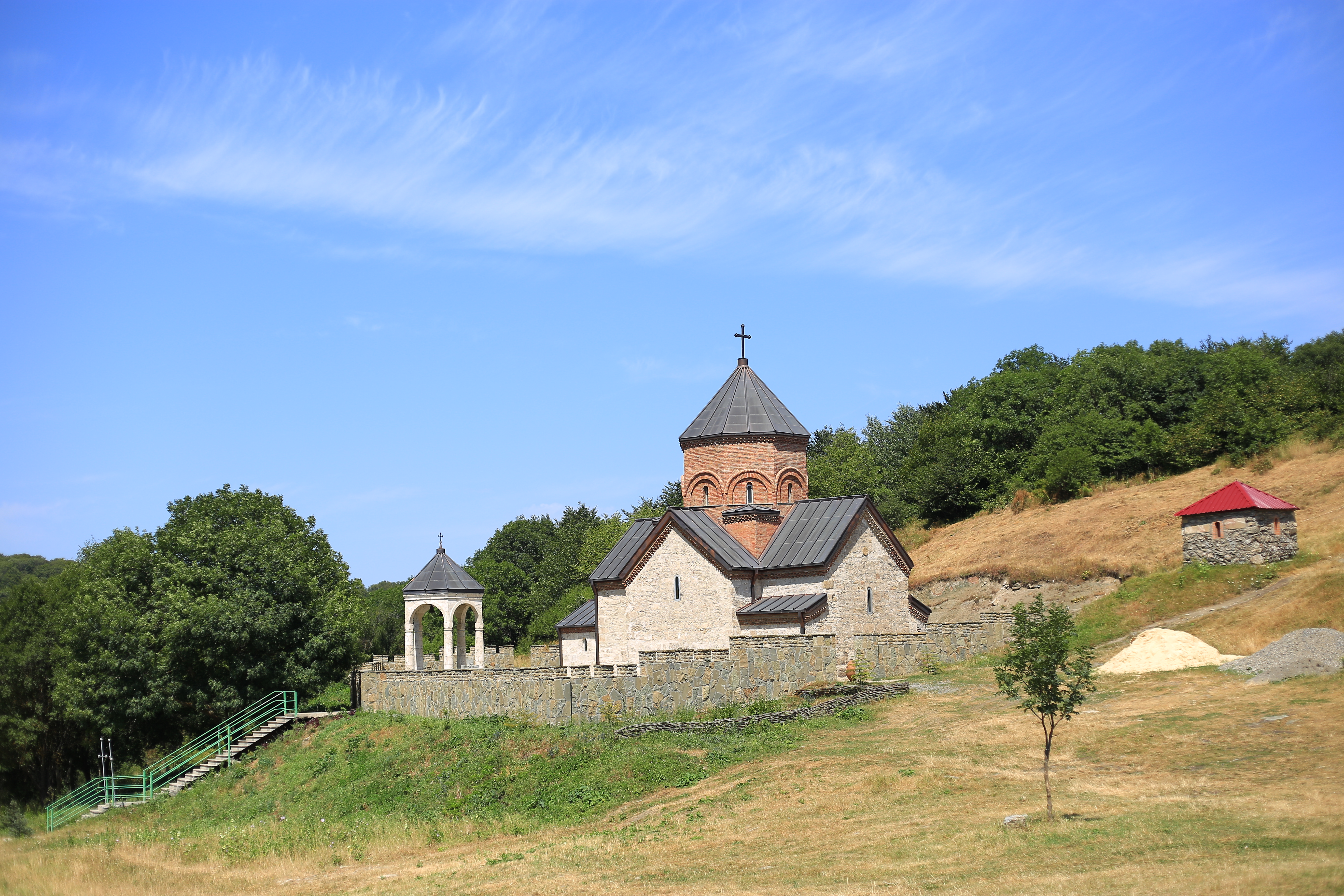 სარკის წმინდა გიორგის ეკლესია